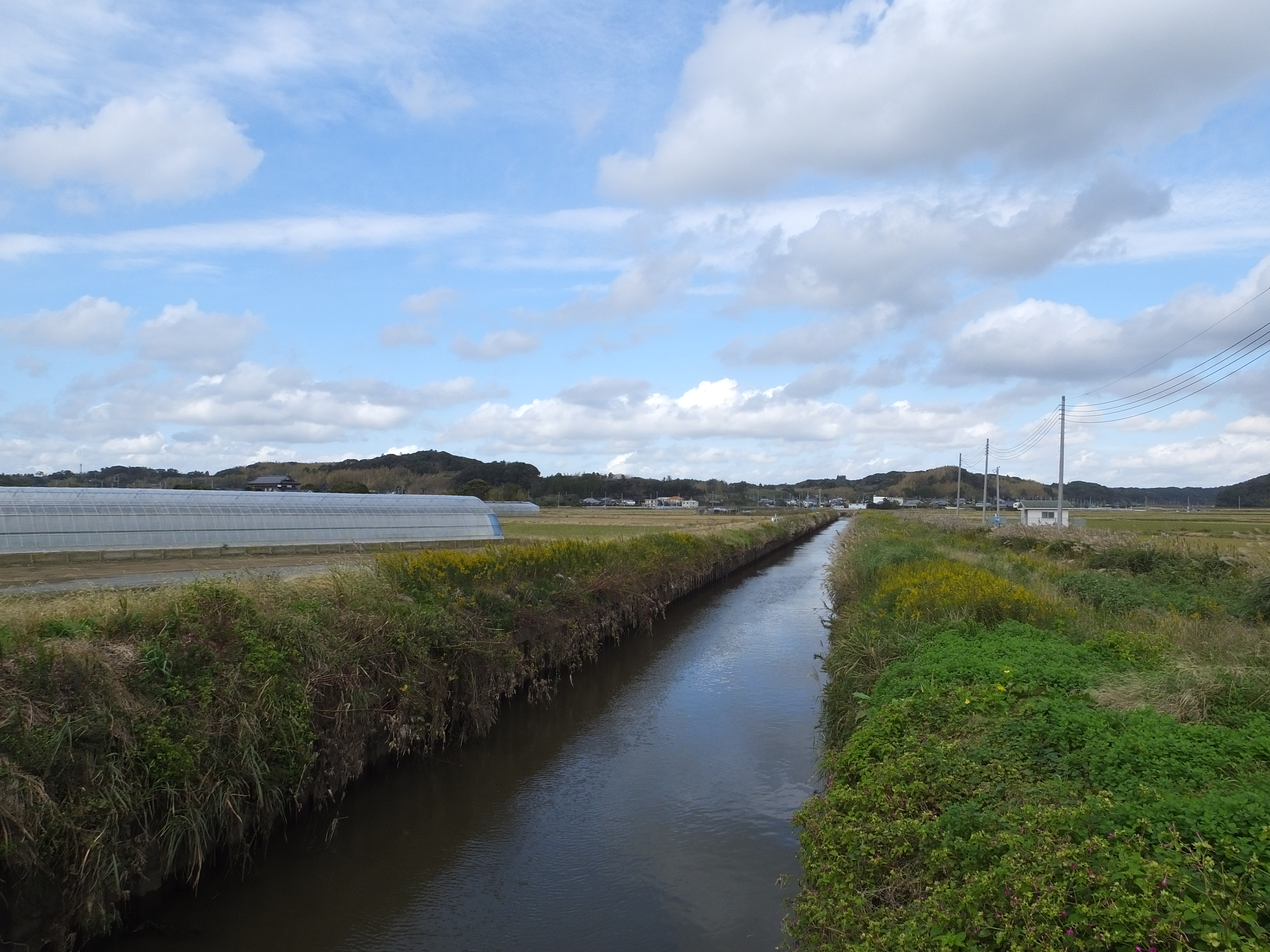 新川（八重穂橋より上流方、千葉県東庄町・旭市）